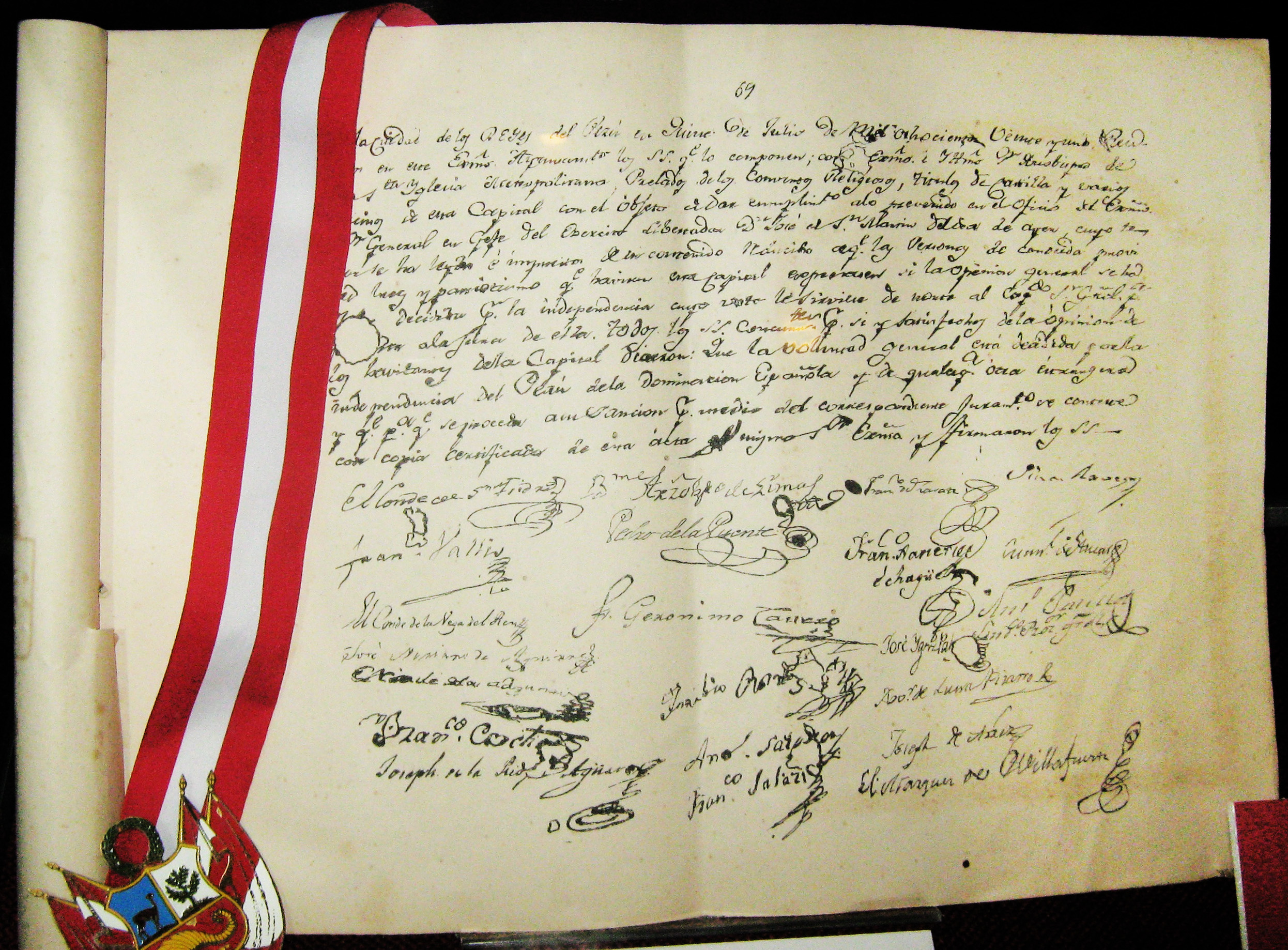 Acta de la Independencia del Perú. Después del discurso, Don José de San Martín firmó el acta de la Independencia.